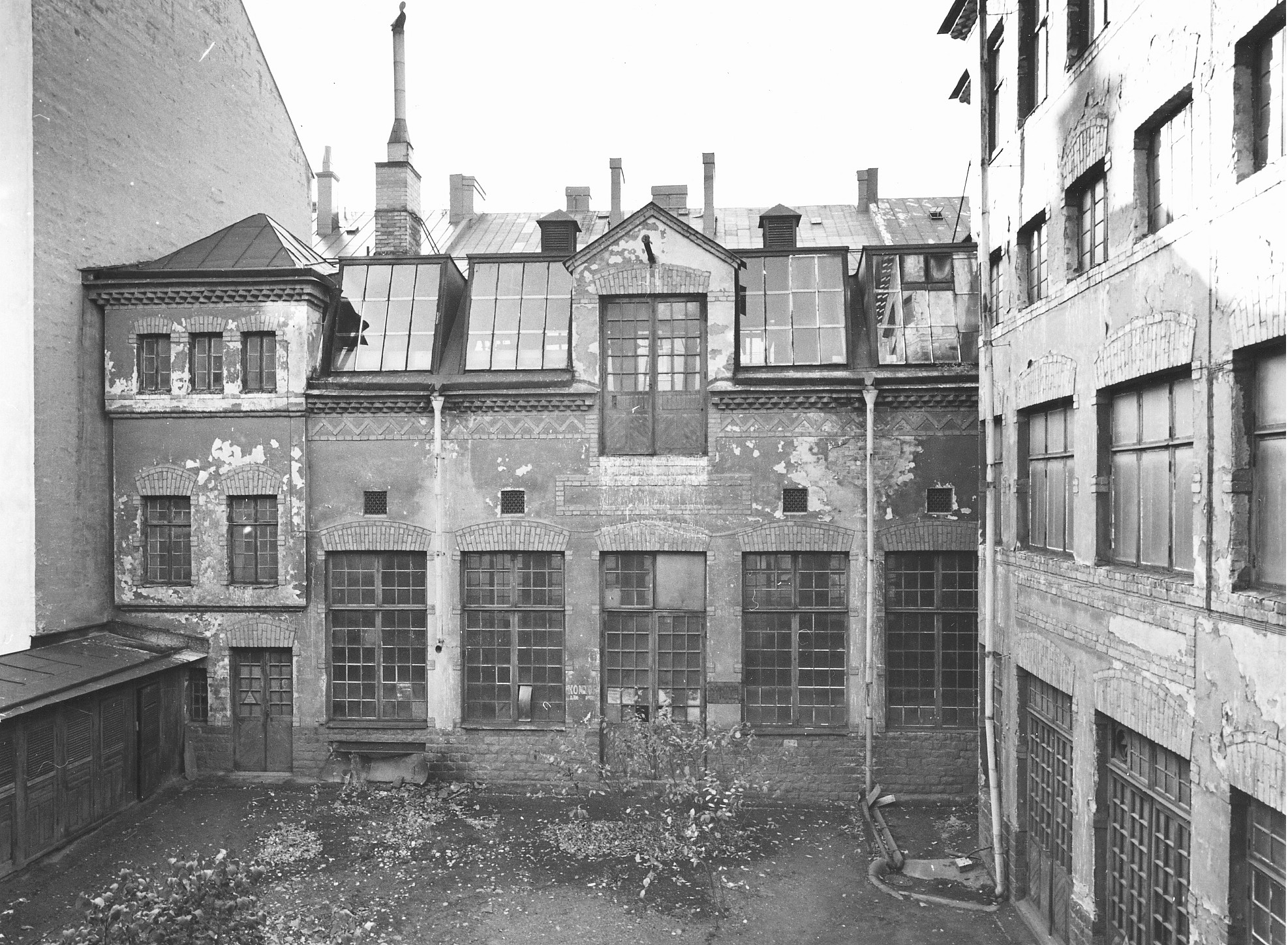 Otto Meyers konstgjuteri, Västmannagatan 81, bakgården